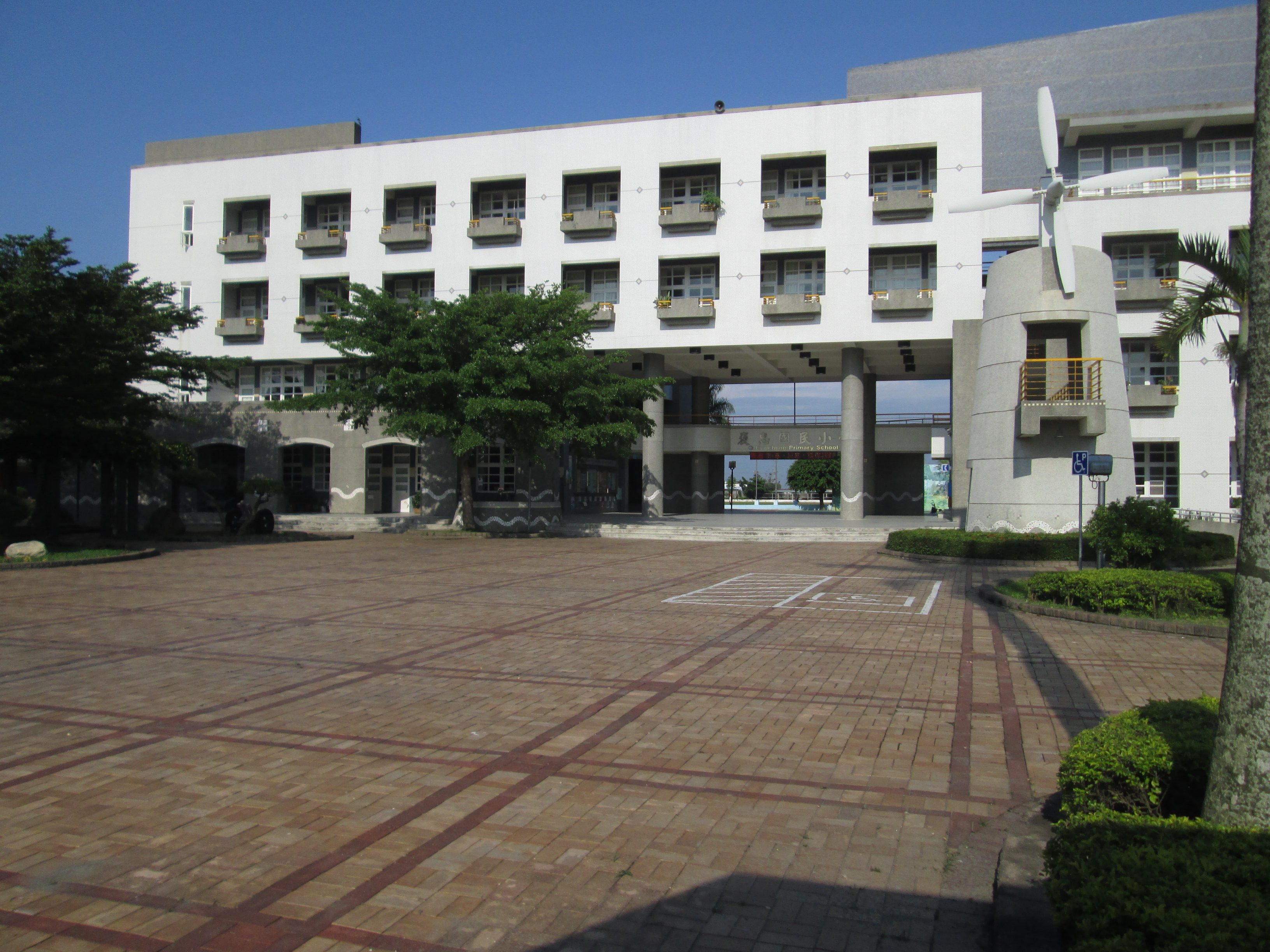 雲林縣褒忠鄉 褒忠國小